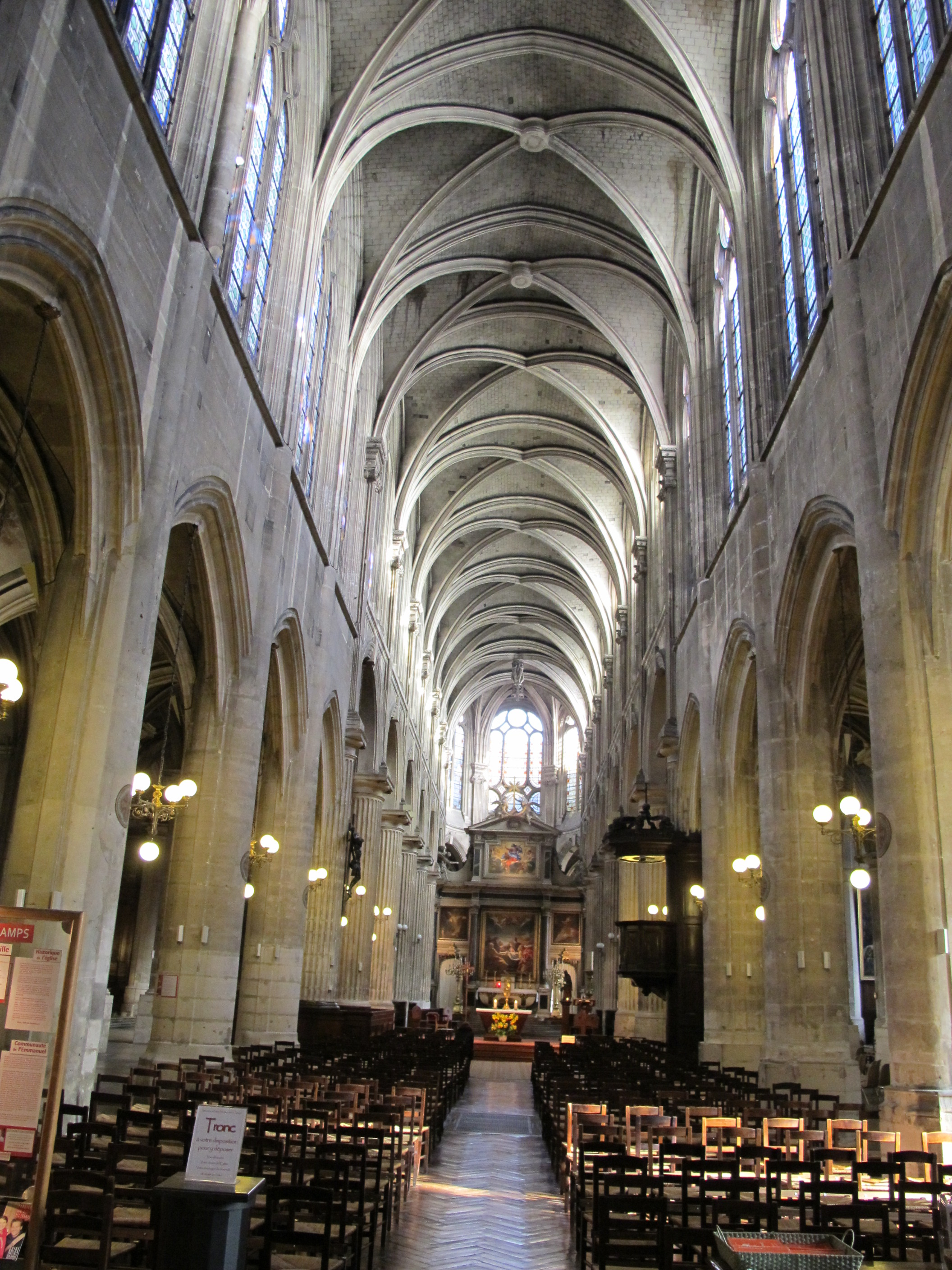 Saint-nicolas-des-champs, interno